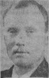 Arkitekten Ivar Jonsson